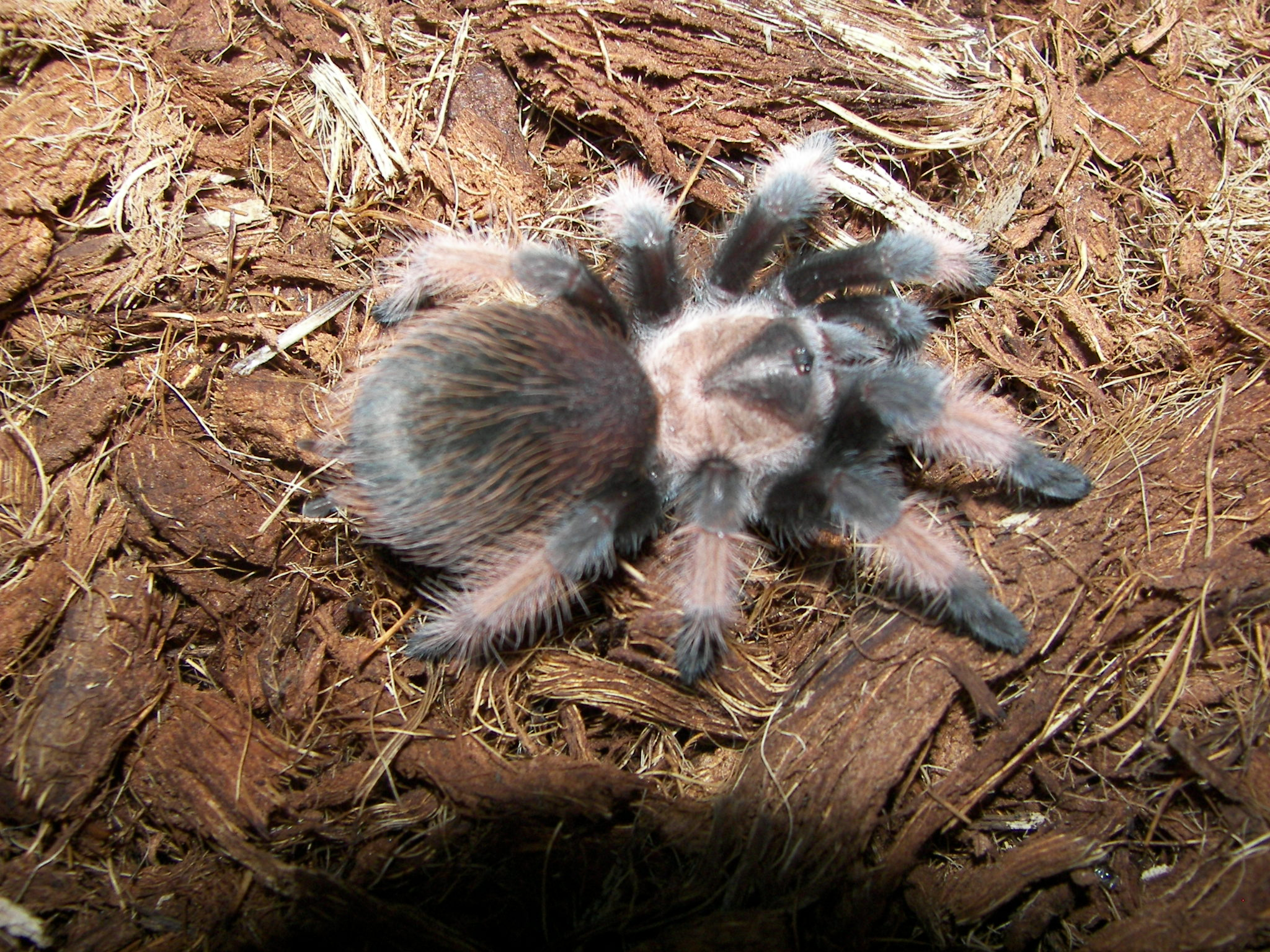 Brachypelma emilia